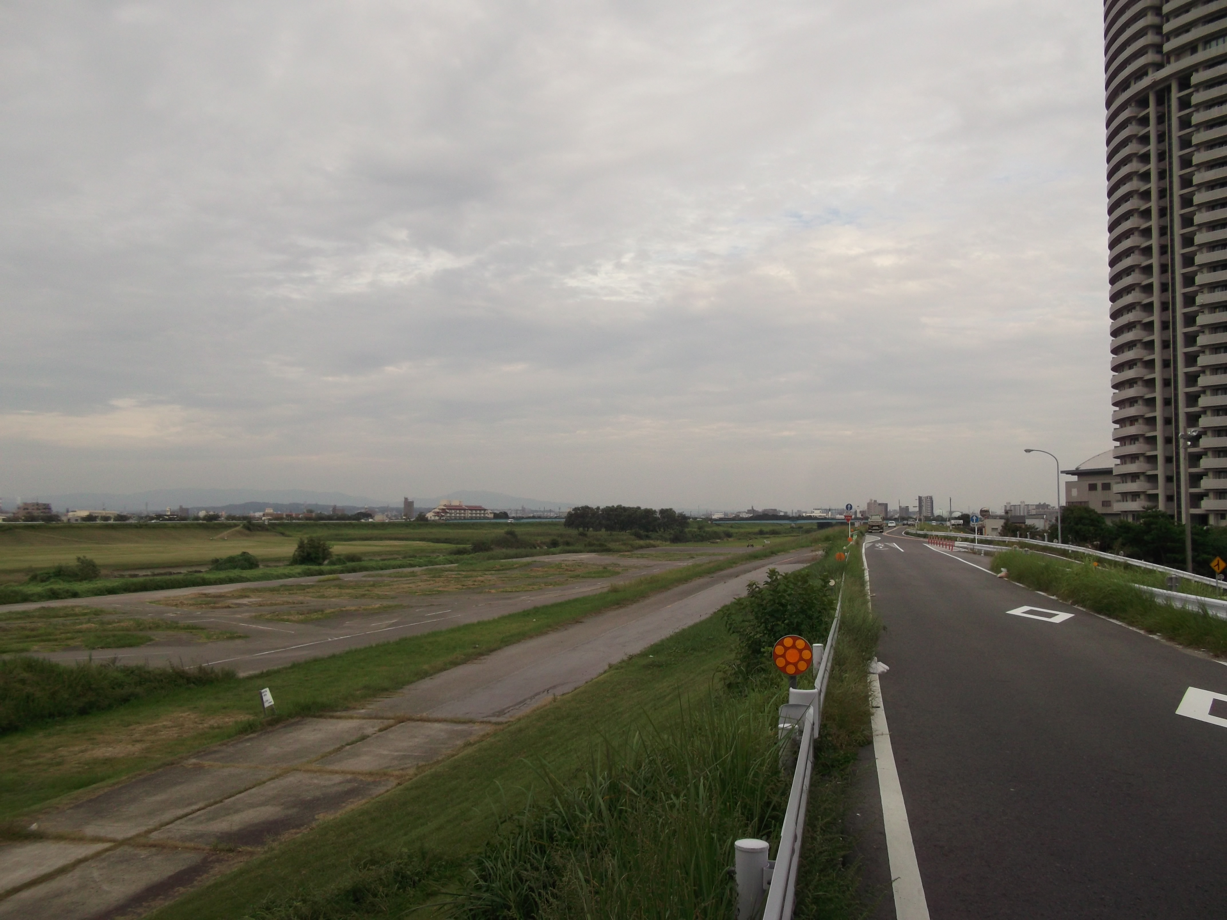 名古屋市北区成願寺の矢田川河川敷を写す。画面右端にザ・シーン城北アストロタワーが写る。堤防道路は愛知県道202号守山西線。